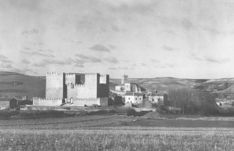 Castillo - Encinas de Esgueva (Valladolid) - Fotografía 110 x 70 B/N